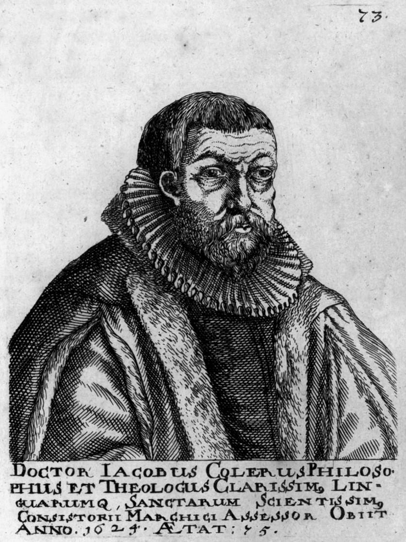 Porträt des lutherischen Theologen Jacob Coler